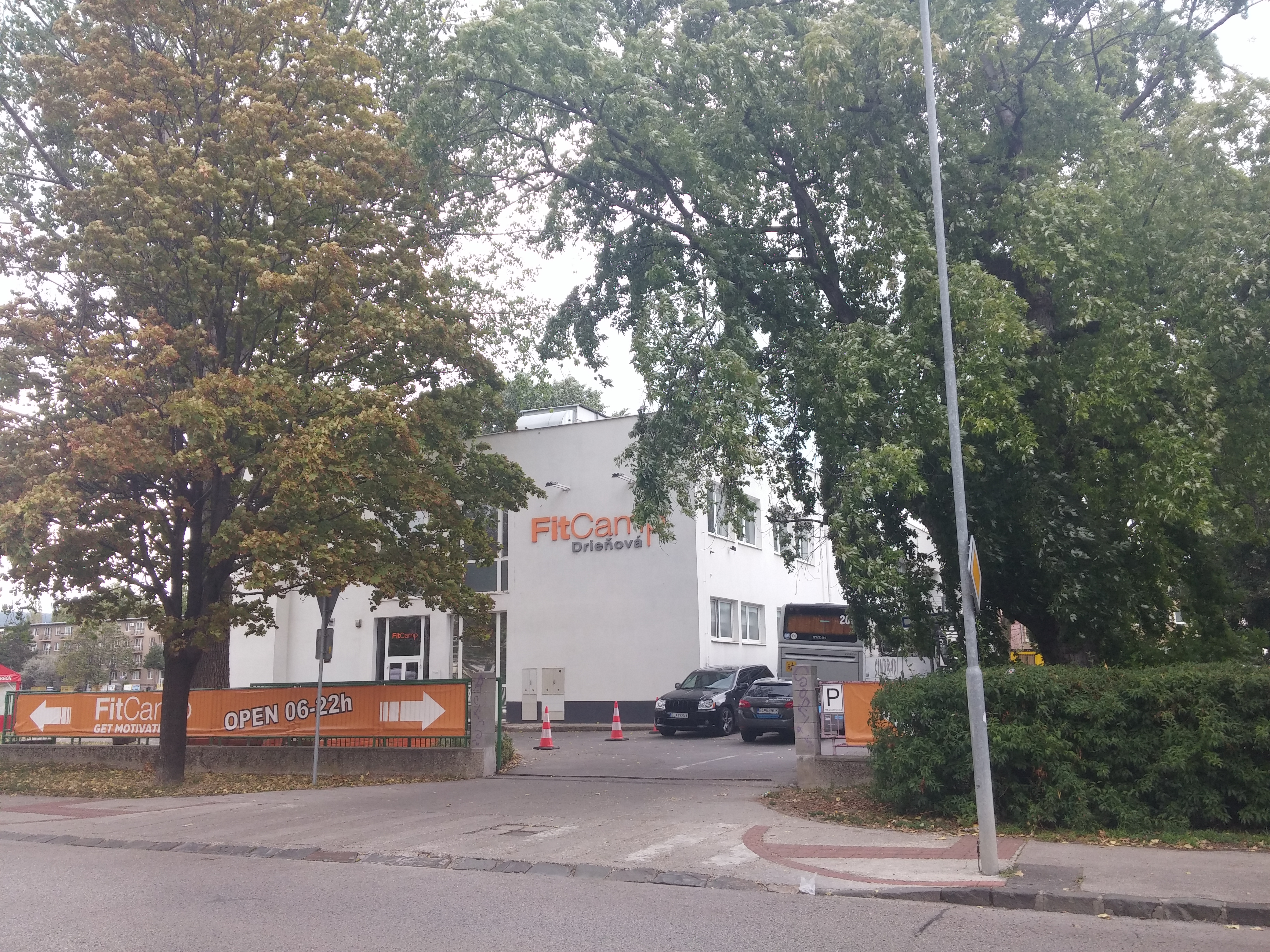 Nevädzová 11/A, Ružinov, Bratislava